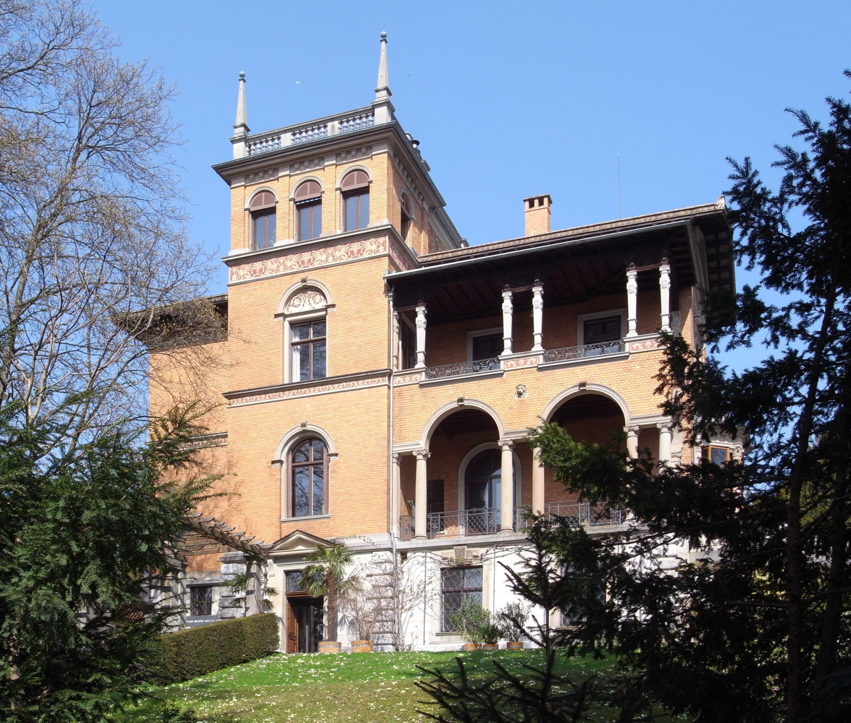 Zürich - Villa Bleuler, Ansicht vom Garten